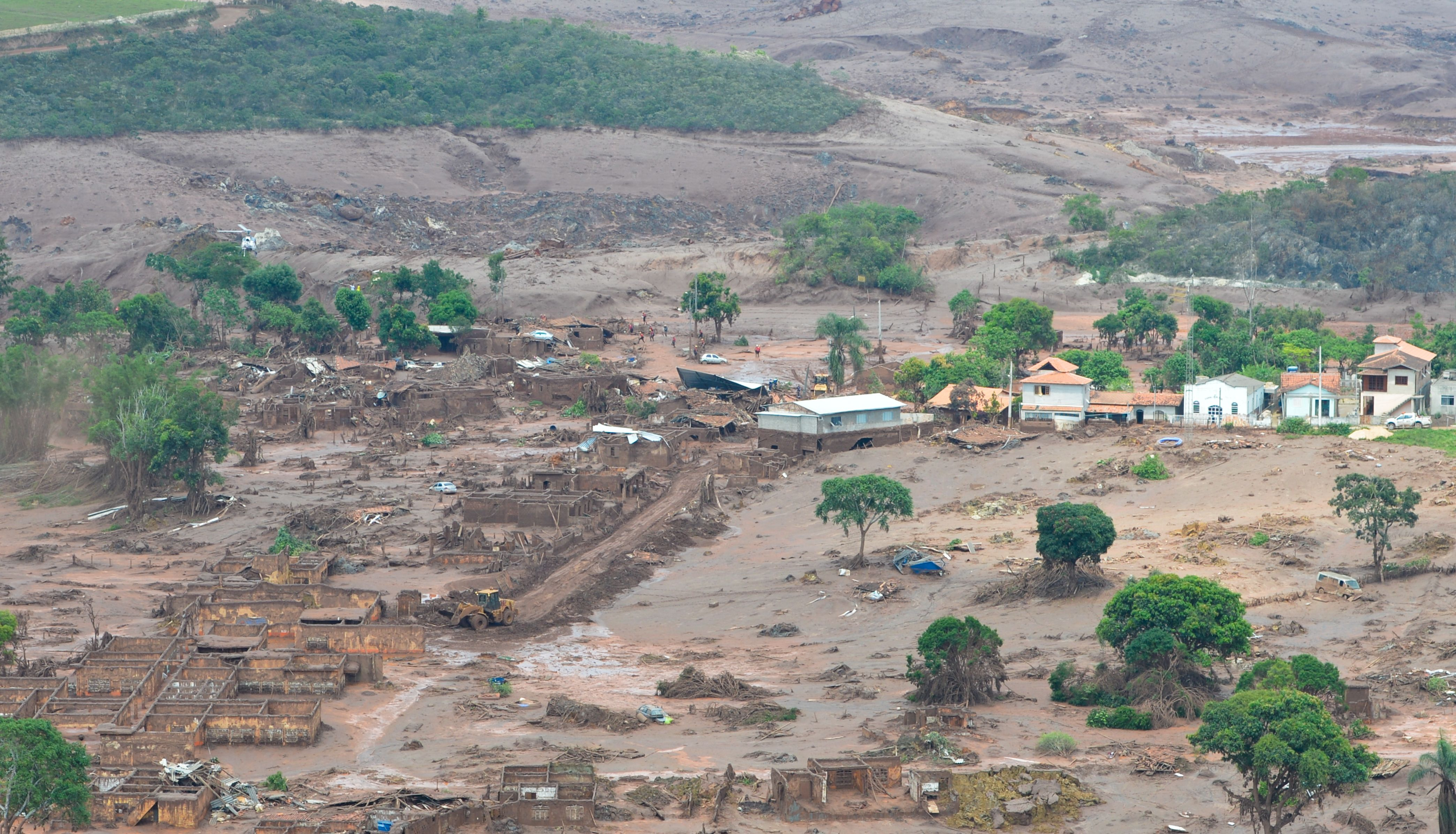 Região destruída por rompimento de barragens em Minas